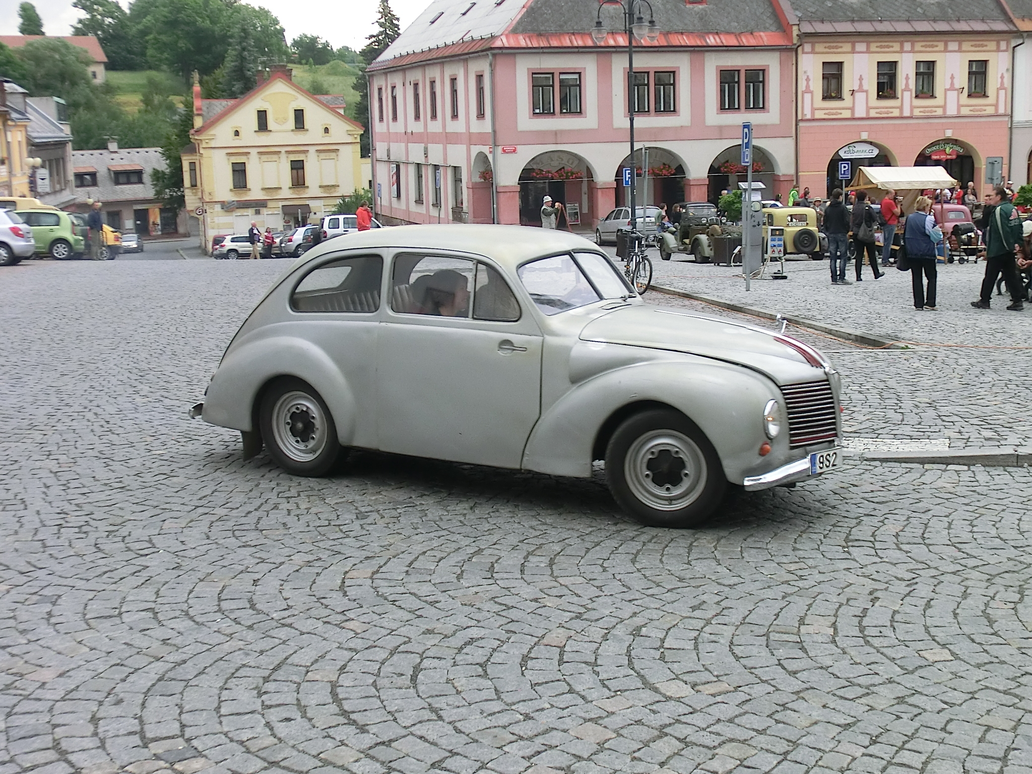 Vůz Aero na soutěži pro historická vozidla "Tatra v Českém ráji 2014", Jilemnice.